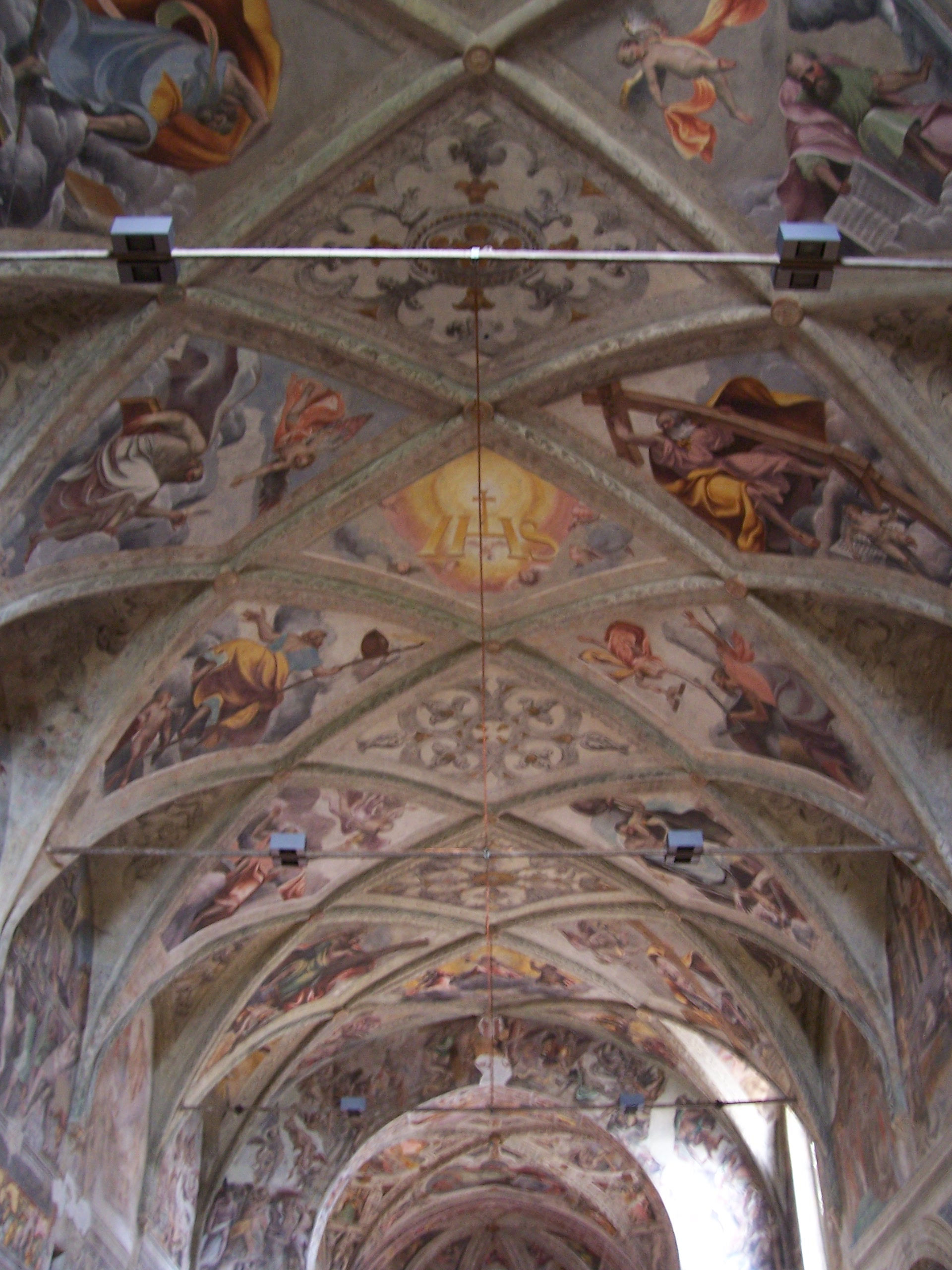 Santissimo corpo di cristo brescia interno2.jpg